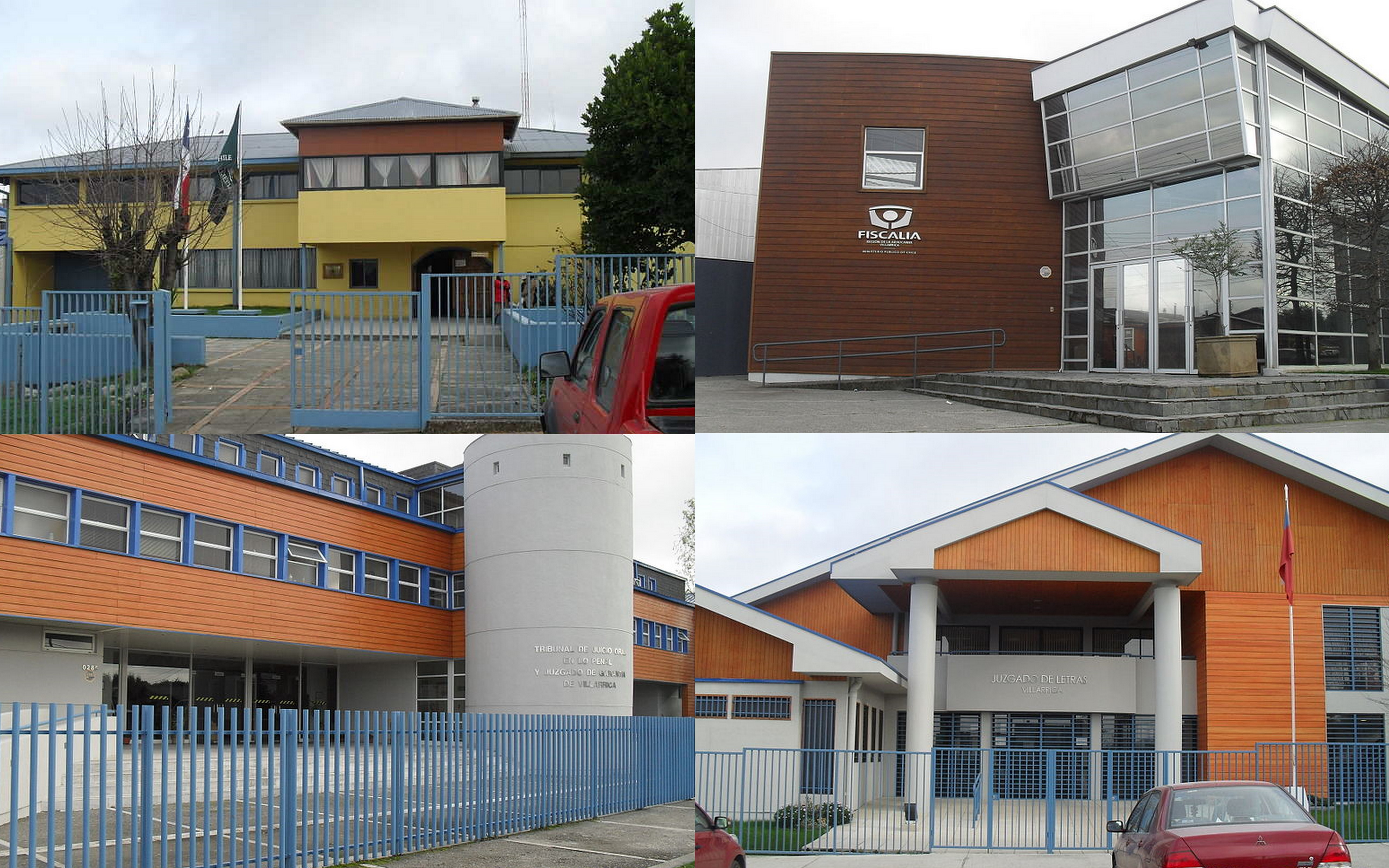 Edificios Judiciales Villarrica